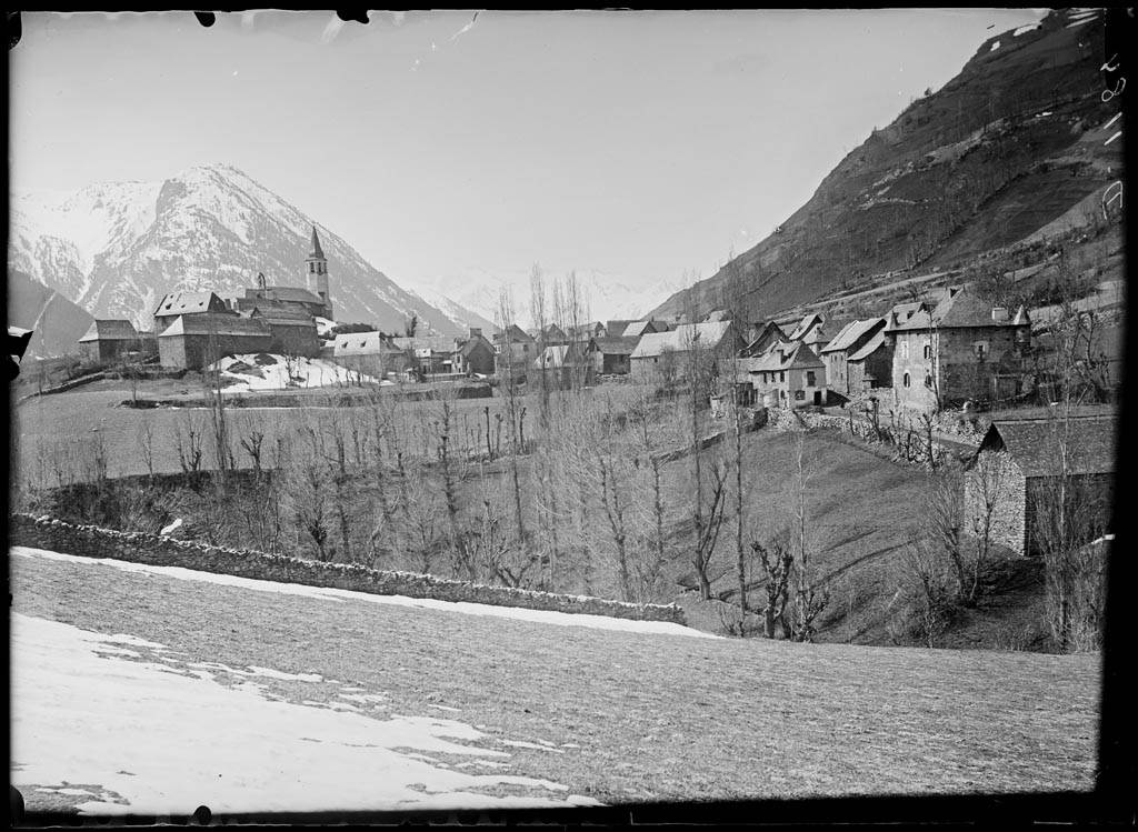 Imatge